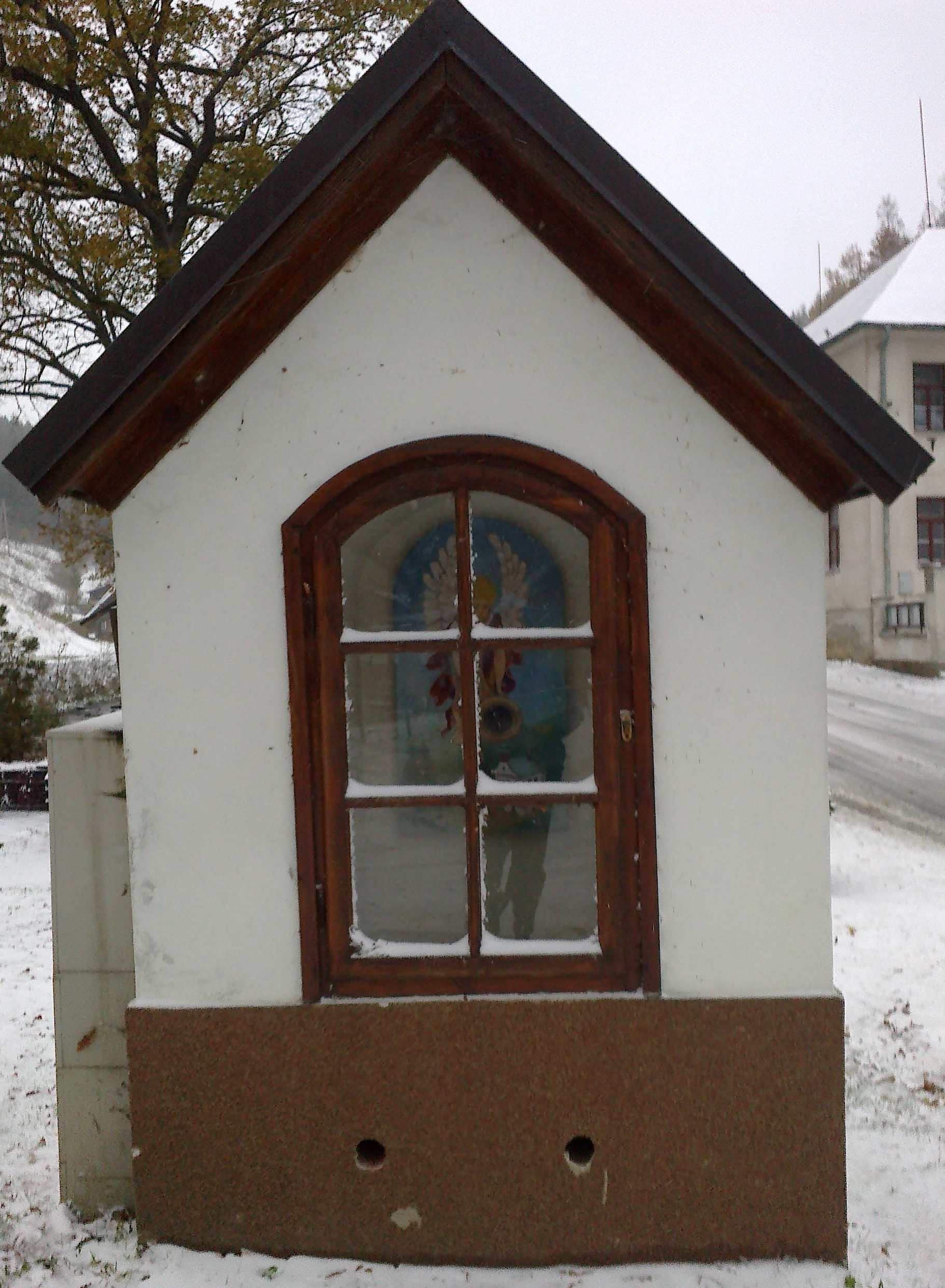 Dolní Dvůr - kaple sv. Michaela